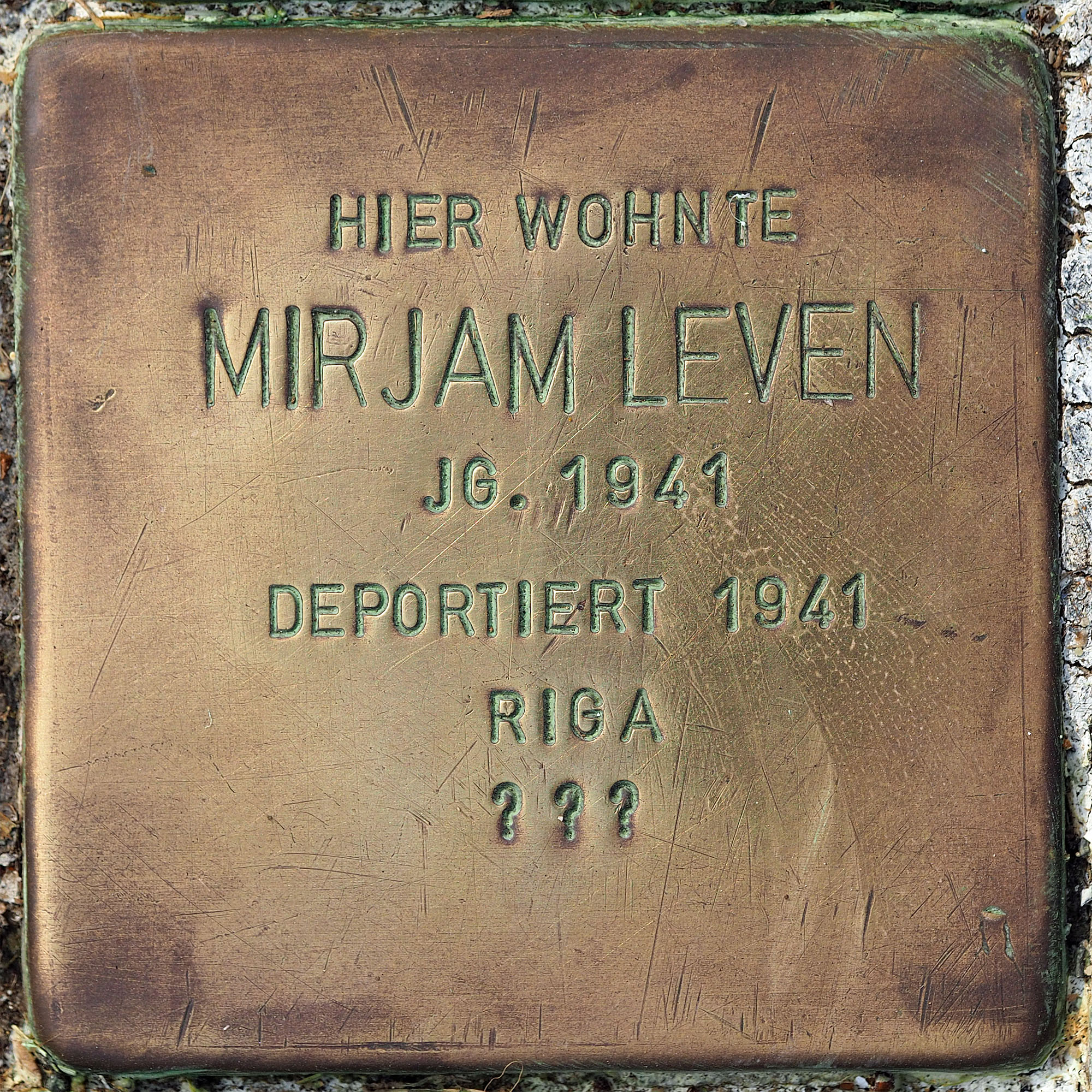 Stolpersteine MG: Leven, Mirjam